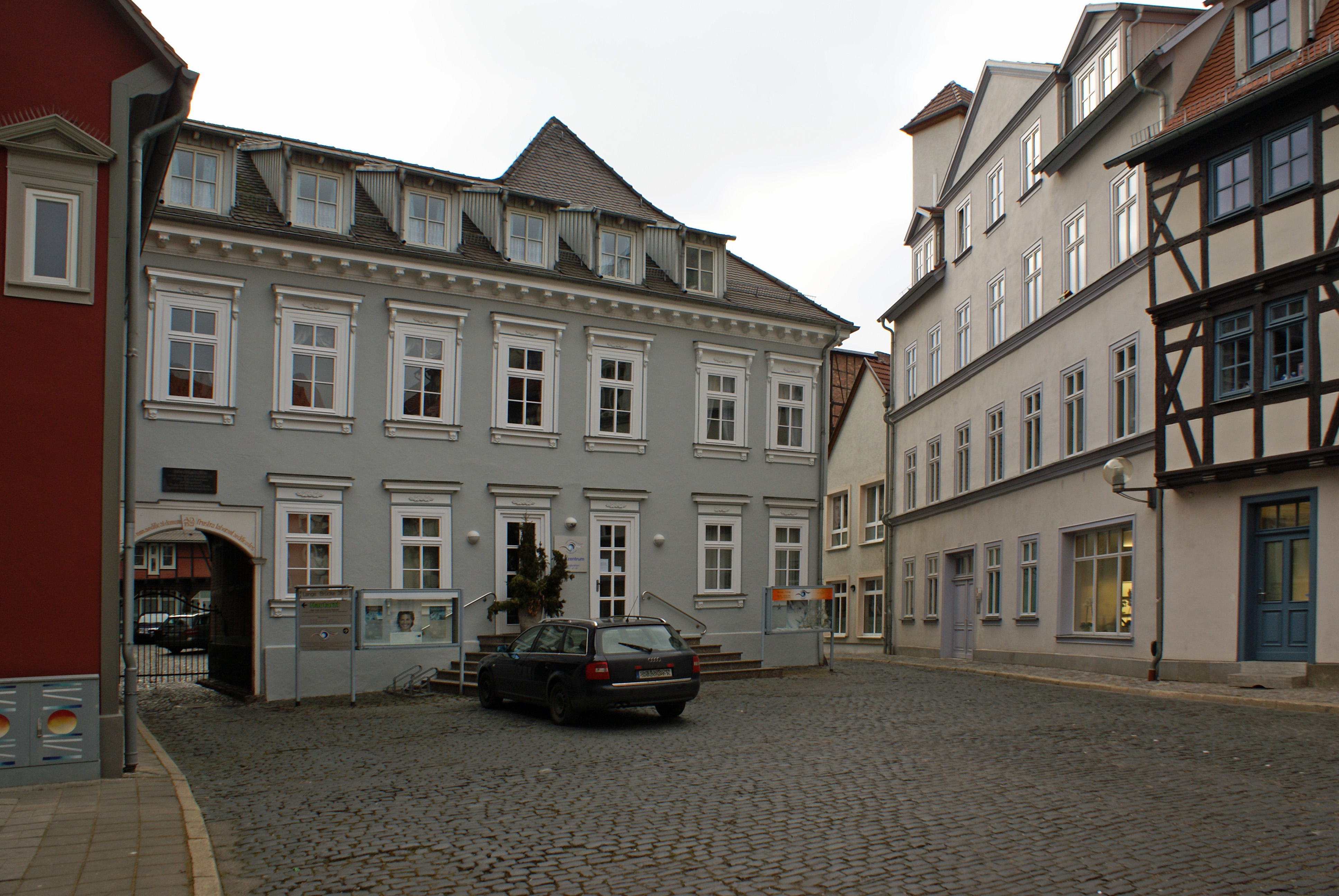 Erfurt - Lange Brücke